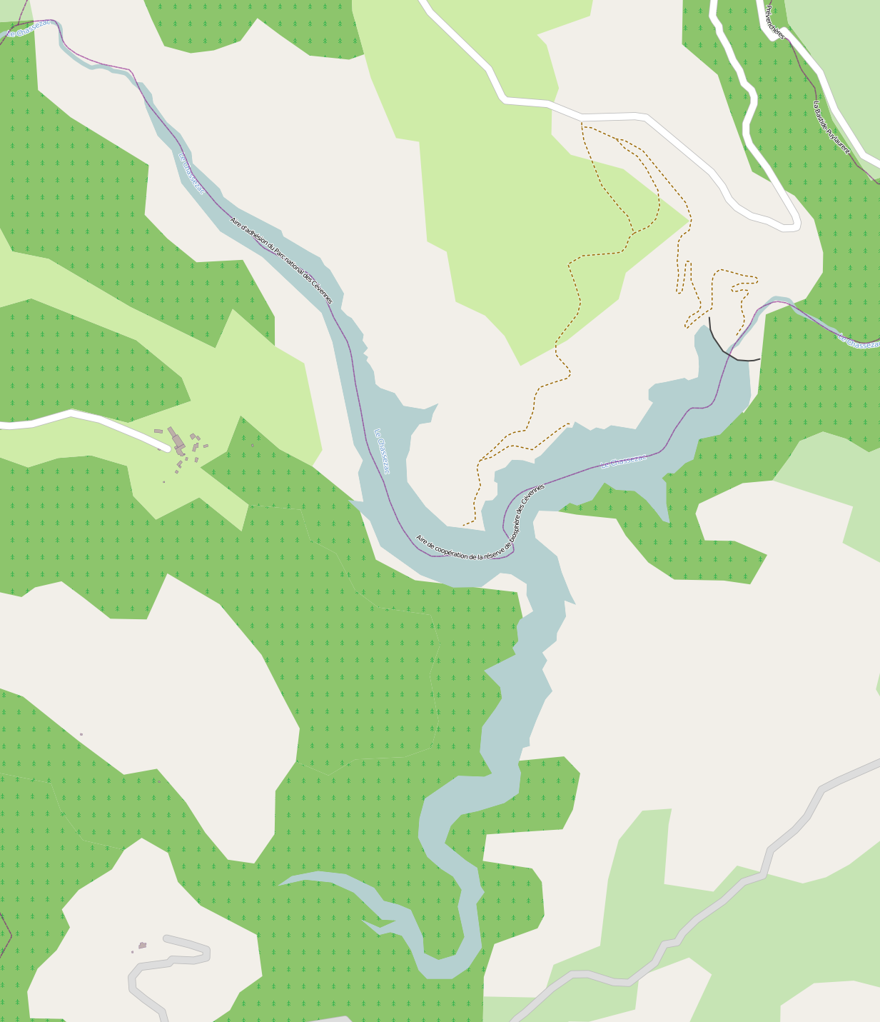 Carte de la retenue de Puylaurent (communes de La Bastide-Puylaurent et de Prévenchères, Lozère). La branche "Chassezac" du lac est celle venant du nord-ouest, la branche du lac formée par son affluent le ruisseau de Malaval est celle venant du sud-sud-ouest.